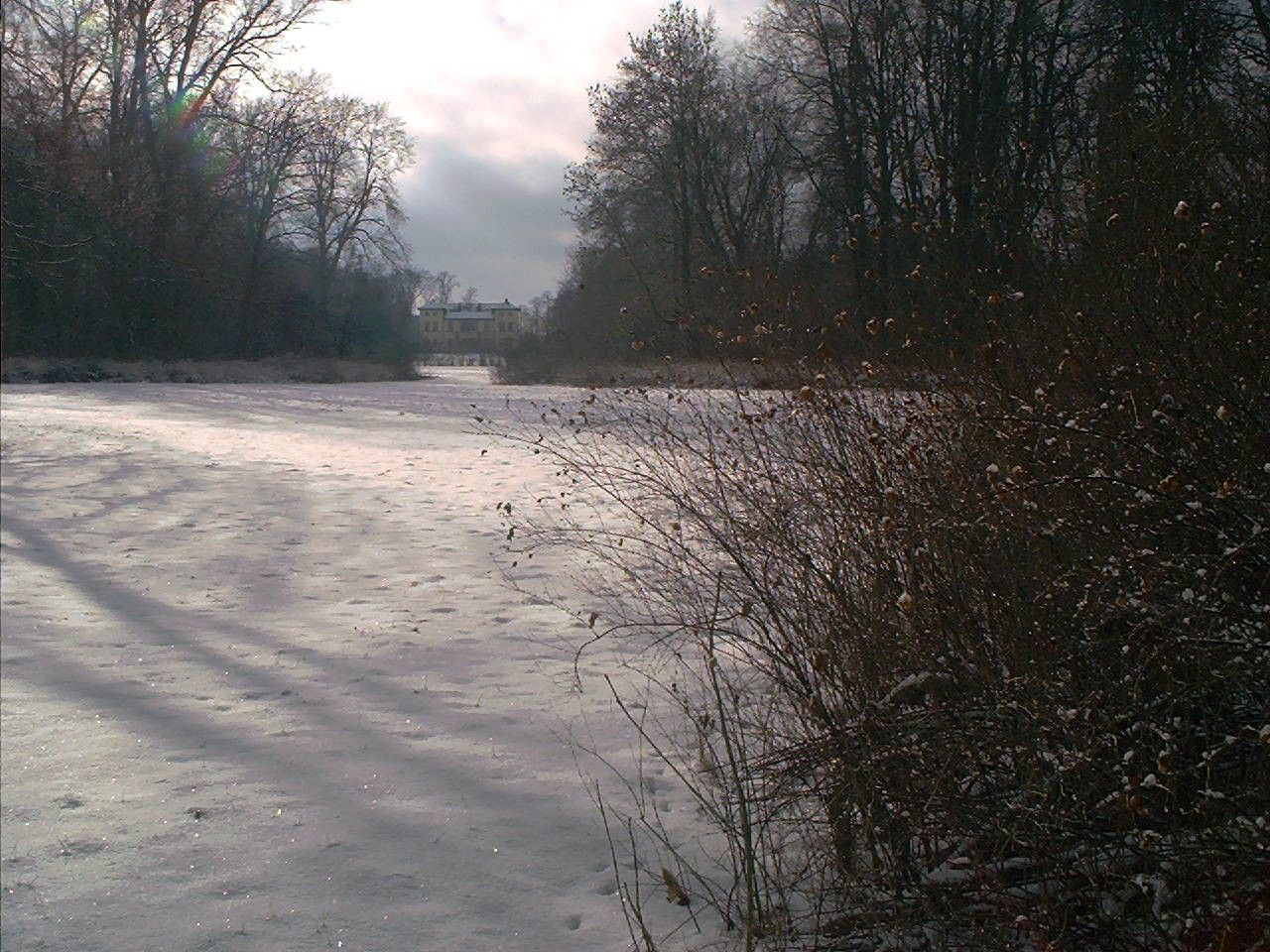 Blick aufs Sommerschloss im Winter, Fürstlicher Park der Fürsten von Hohenzollern-Sigmaringen, Park im Stil der Englischen Parks, 72505 Krauchenwies